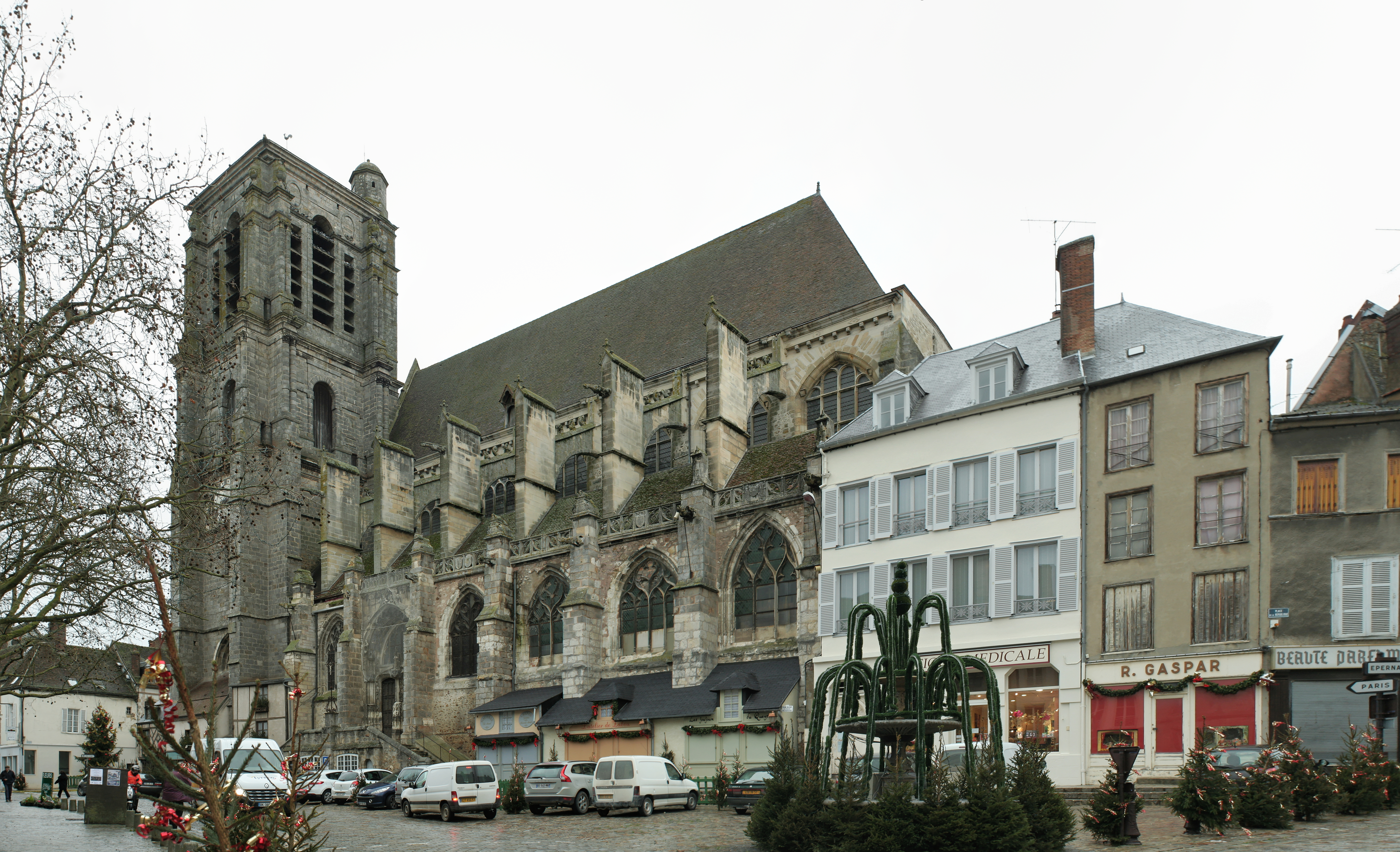 Église Saint-Denis de Sézanne (Marne). Vue générale de la façade sud, avec maisons prises dans les contre-forts.